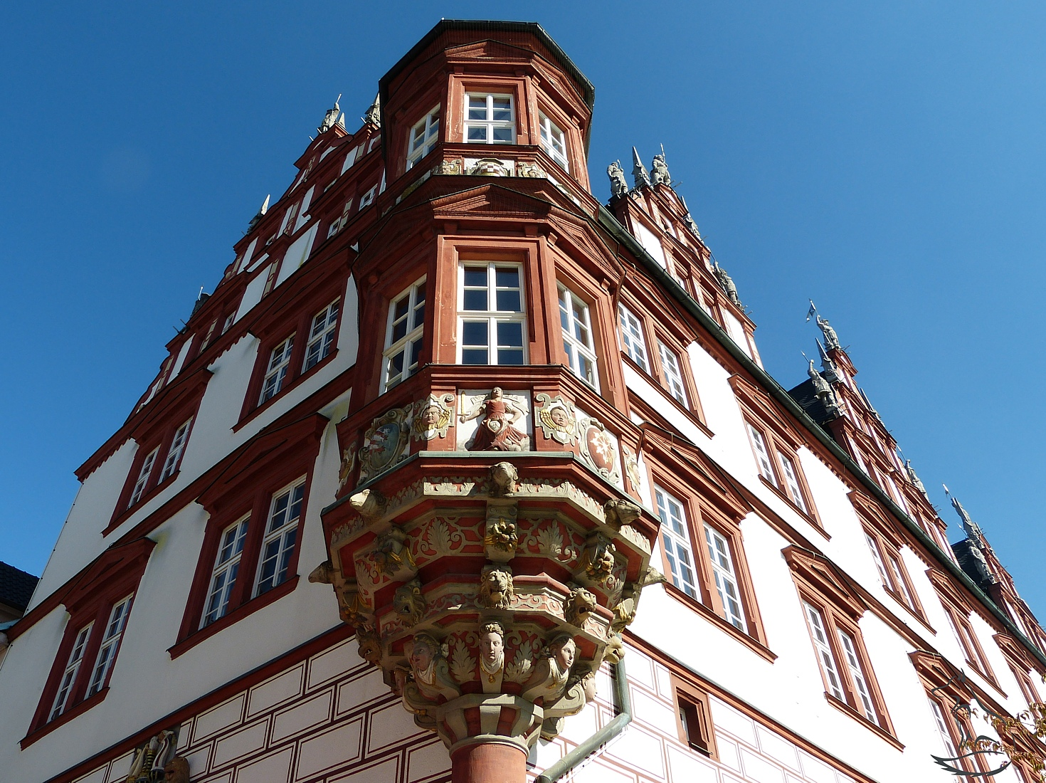 Der südwestliche Erker am Stadhaus